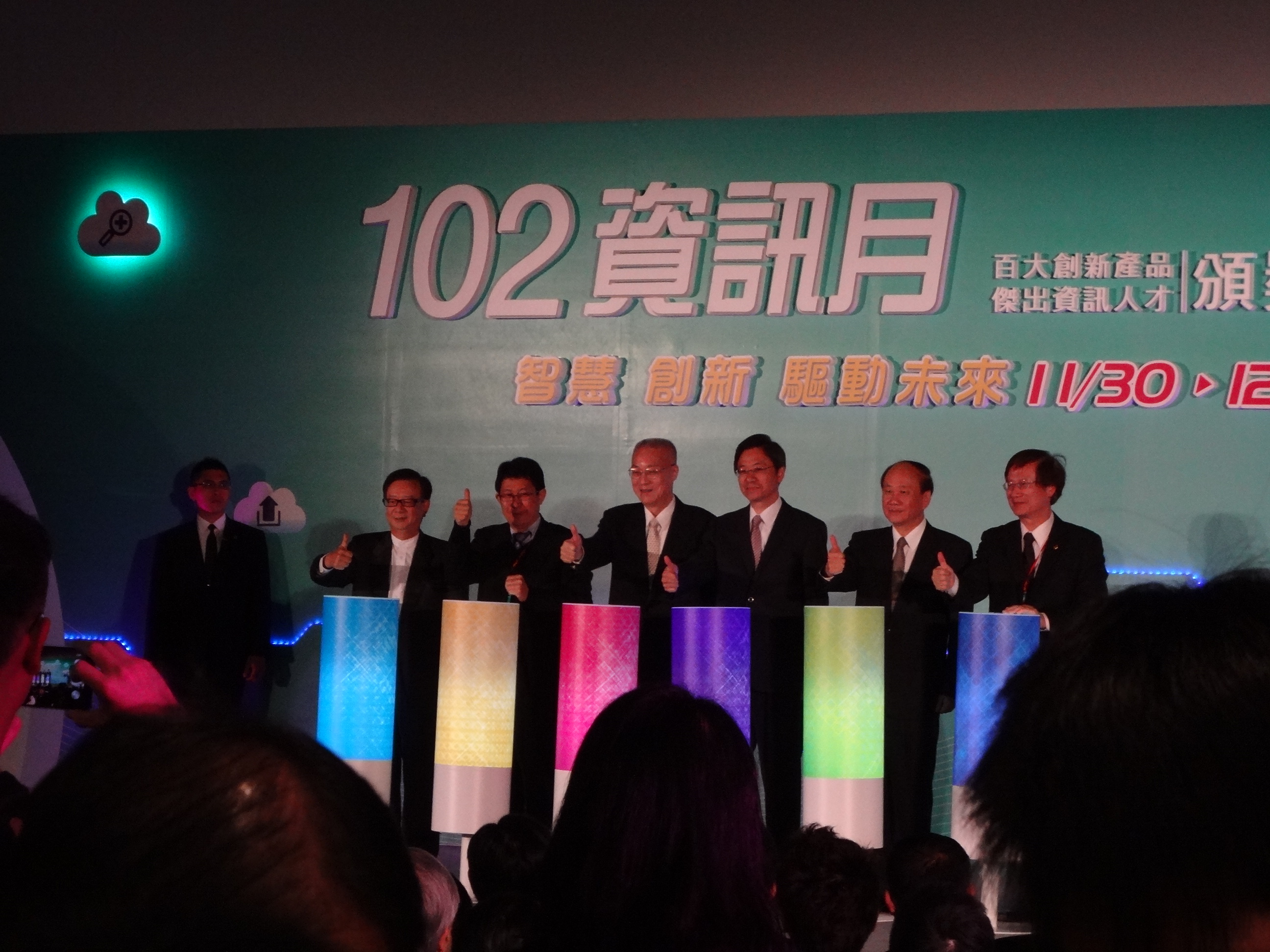 2013年臺北資訊月開幕典禮，中華民國副總統吳敦義、經濟部部長張家祝、教育部部長蔣偉寧、行政院政務委員張善政、資訊月籌備委員會主任委員劉瑞復、臺北市電腦公會監事會召集人宣明智均出席。